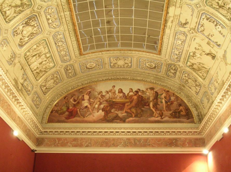 Livorno: interno del Palazzo de Larderel (XIX secolo). La Gran Galleria.